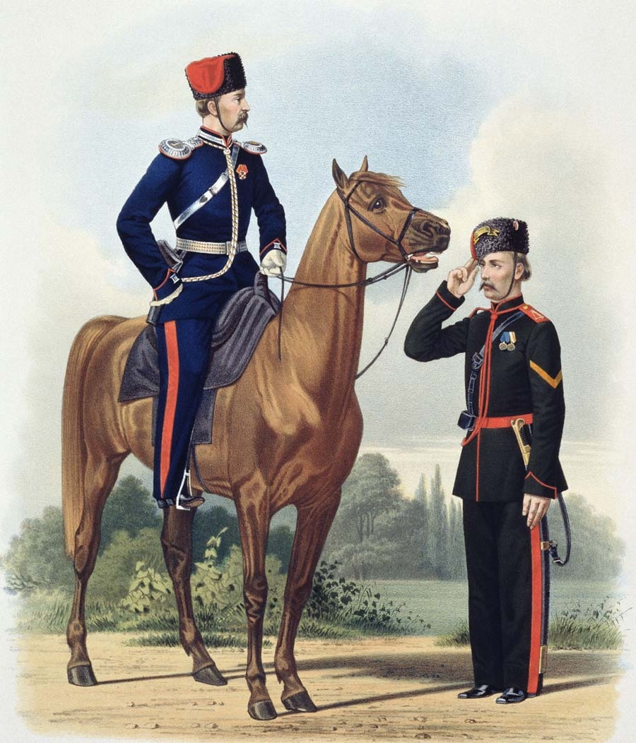 Донские Казачьи полки и артиллерия, 30 сентября 1867. (Парадная форма).